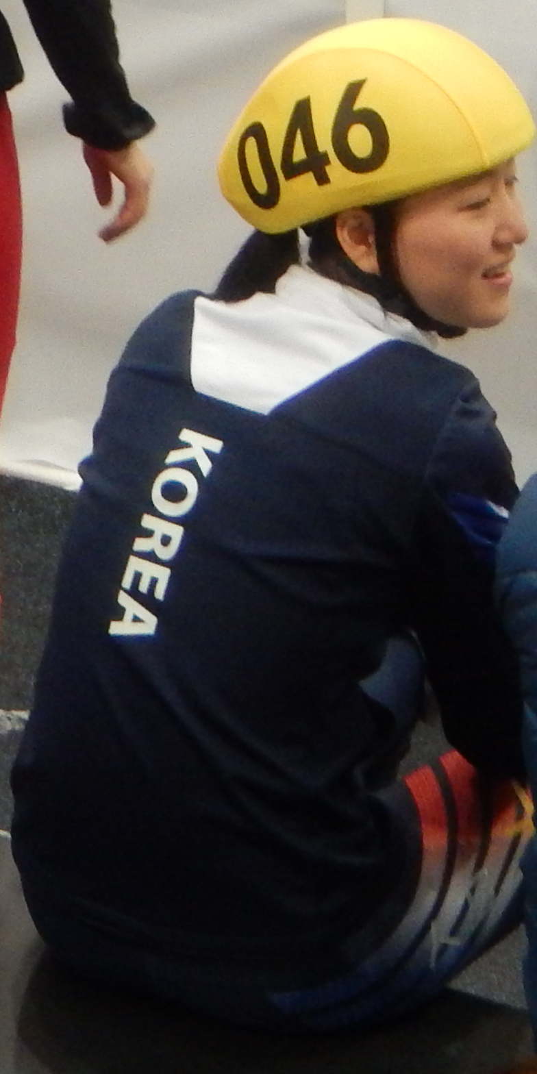 Чемпионат мира по шорт-треку 2015 в Москве Эстафета. Женщины. Полуфинал.